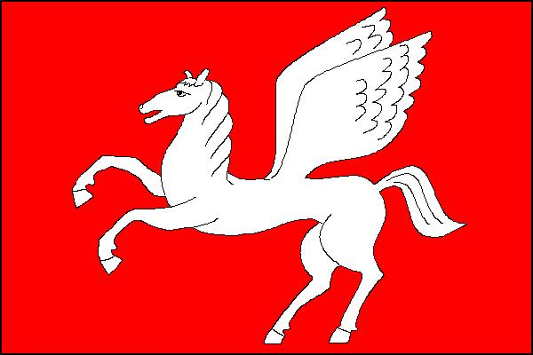 Vlajka obce Mrákotín (okres Chrudim)